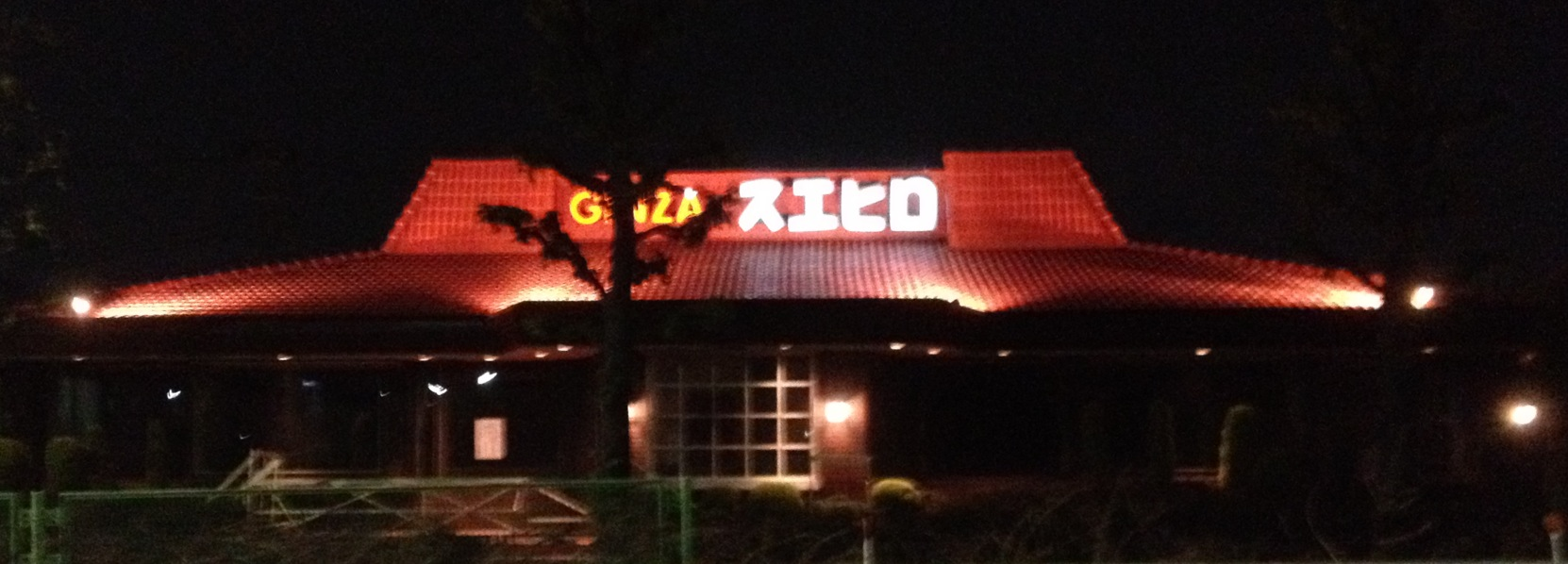 店舗例（環八沿い）閉店している。